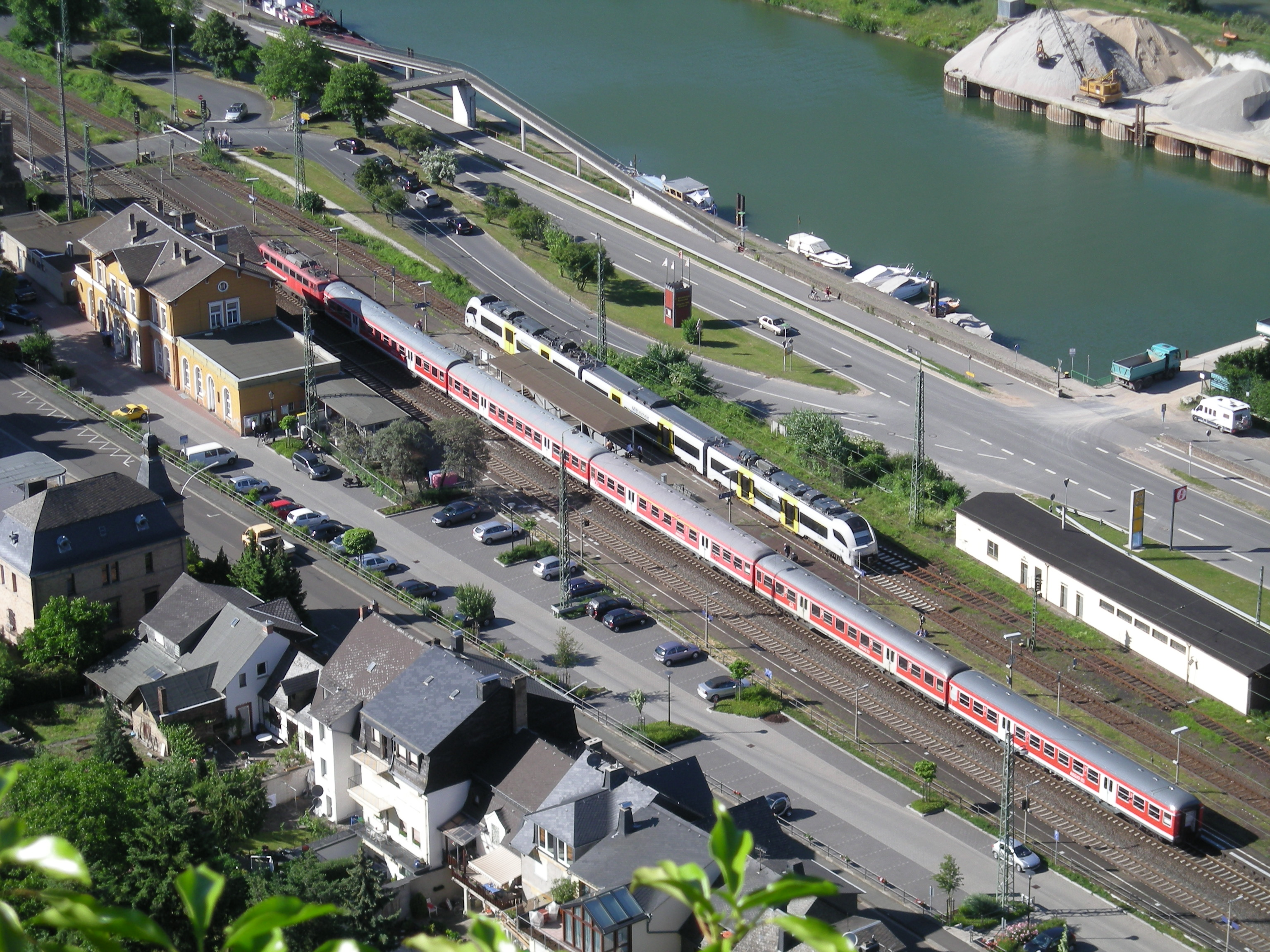 Luftansicht Bahnhof Oberwesel